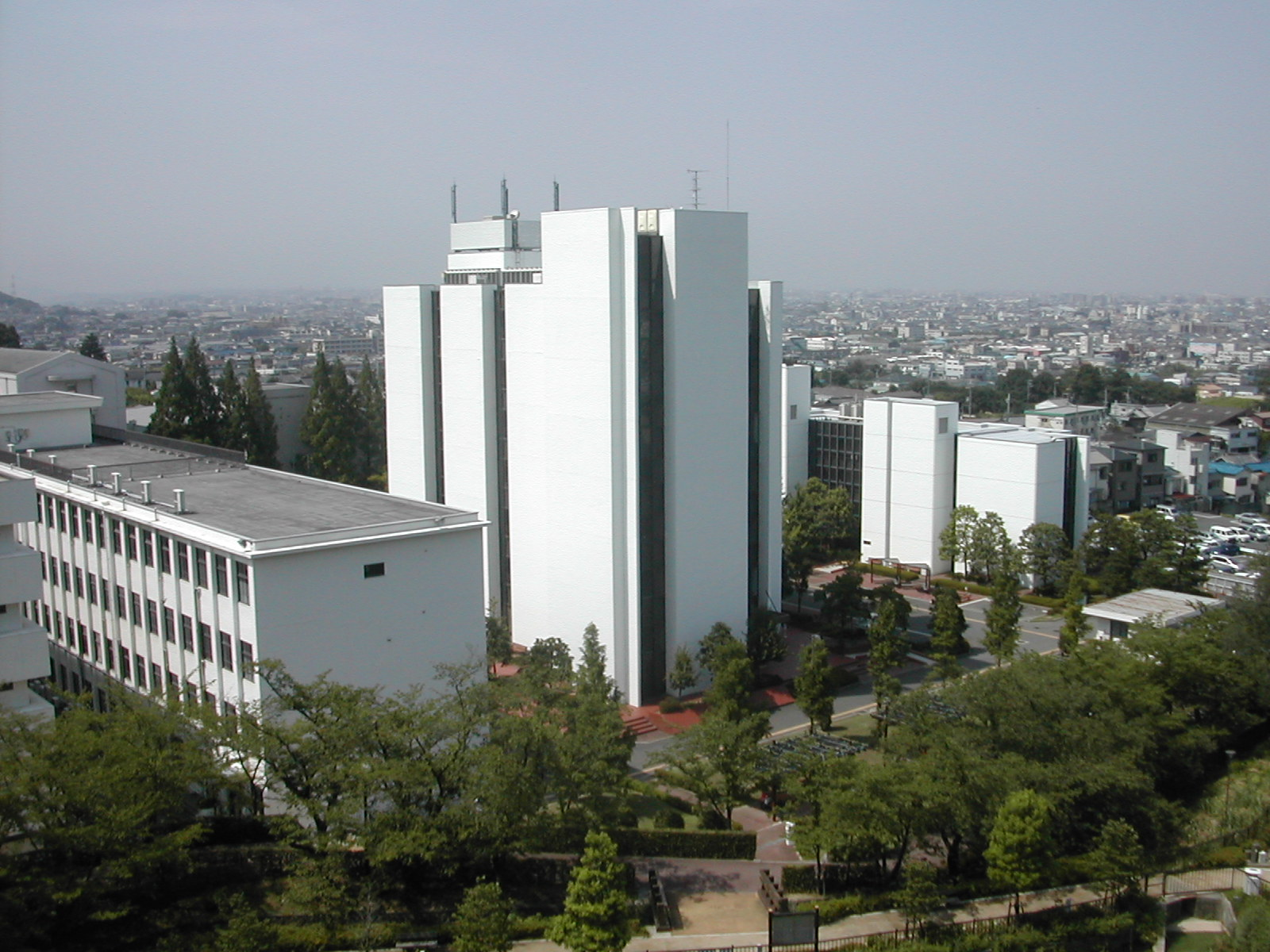 大阪経済法科大学（2005年7月28日撮影者により撮影）